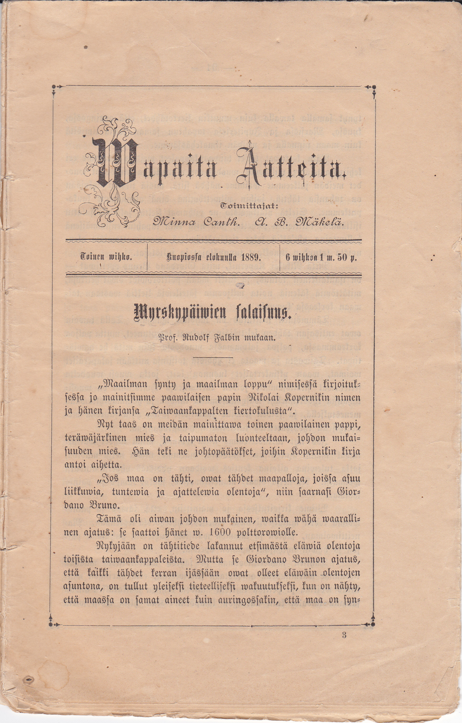 Wapaita aatteita lehti 2/1889